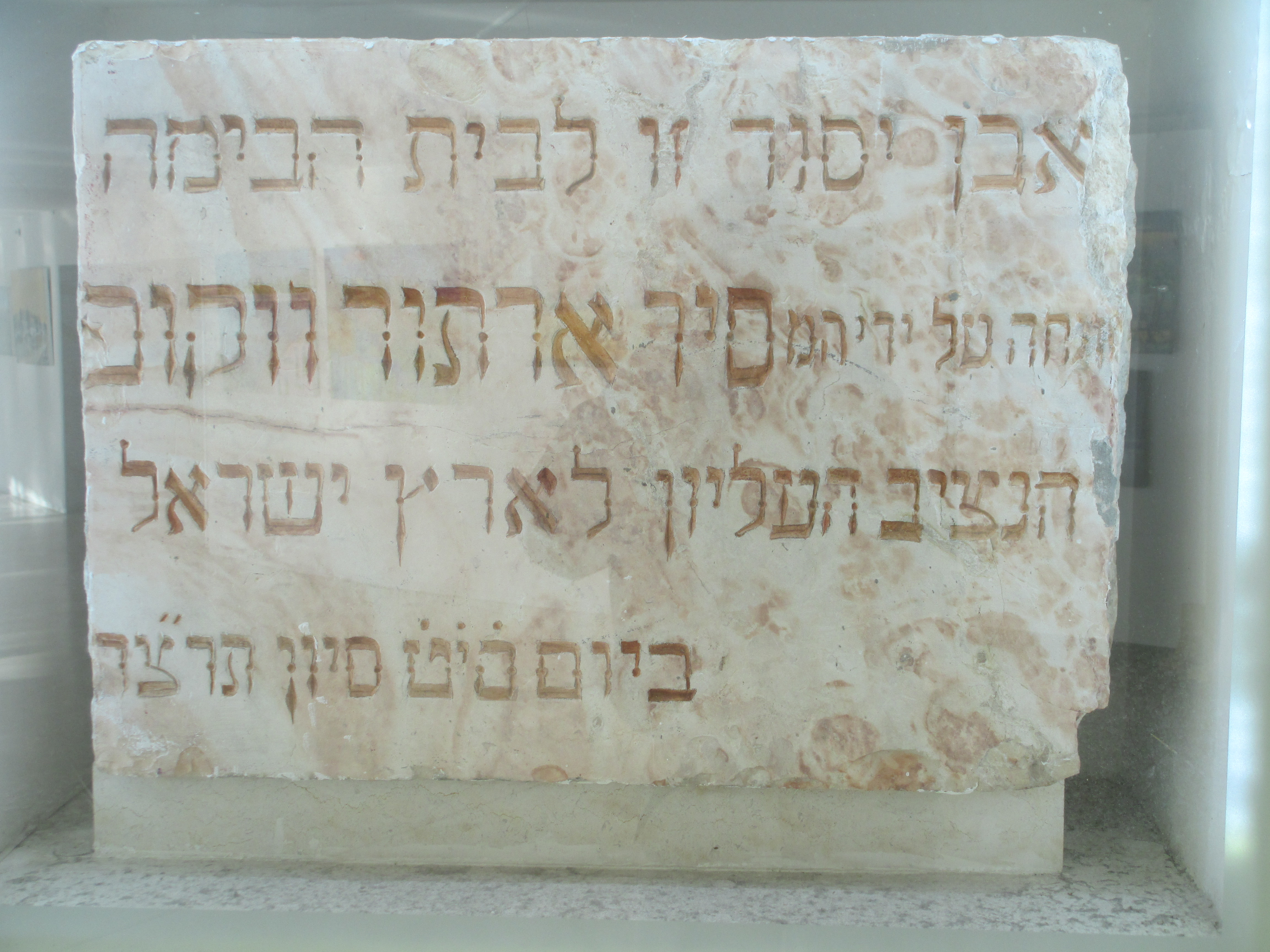 אבן הפינה לבניין תיאטרון הבימה